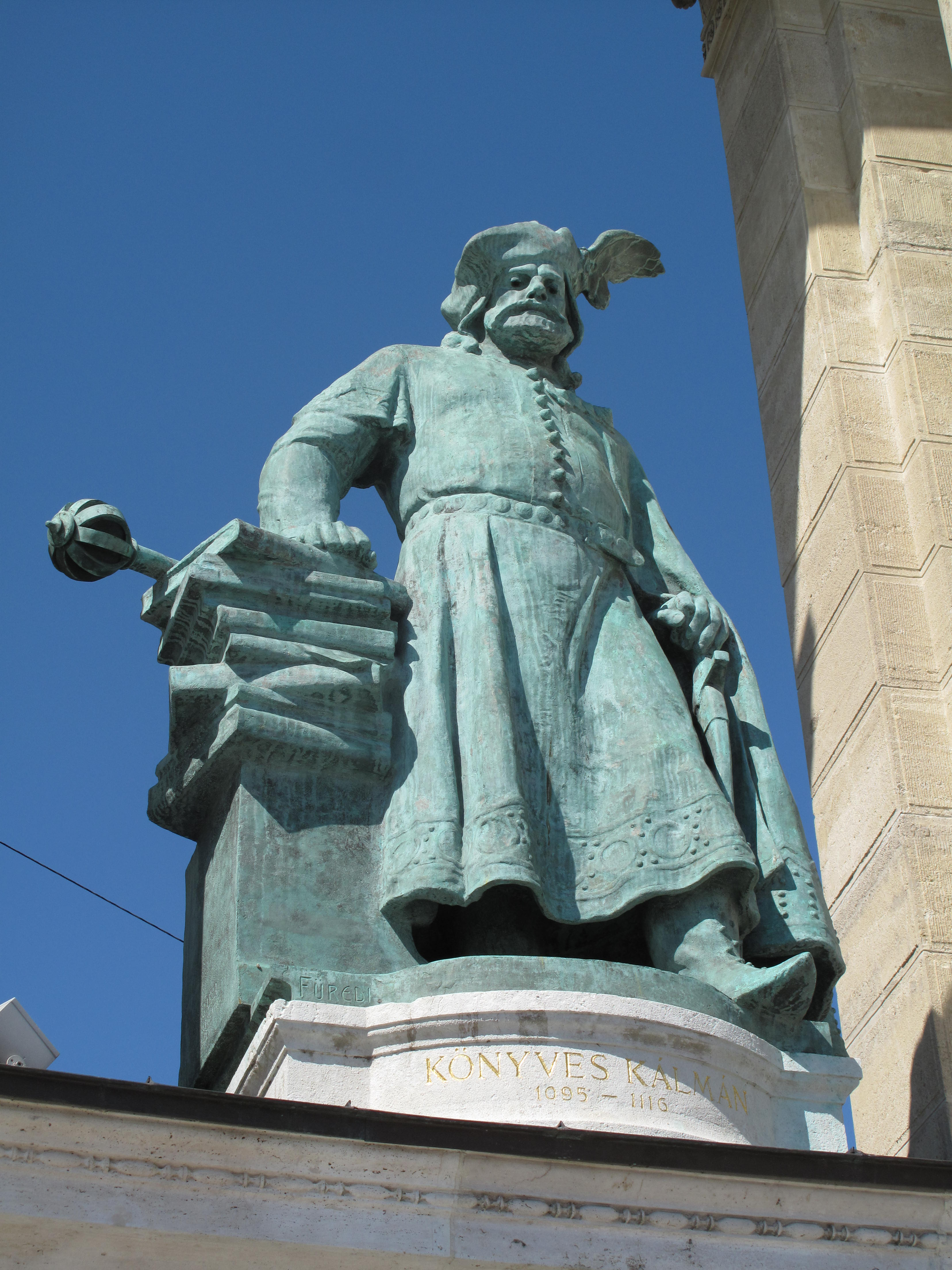 Náměstí Hrdinů, Budapešť